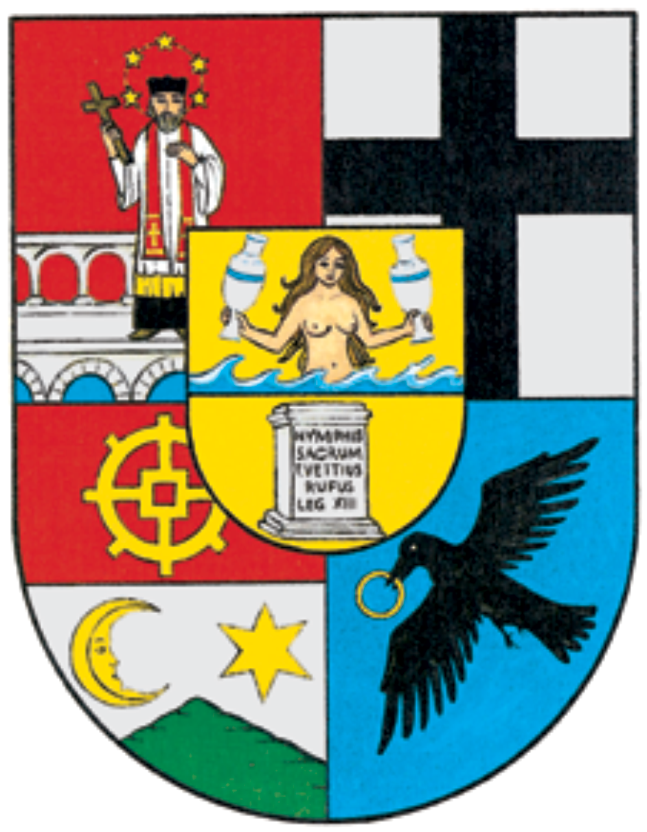 Wappen des 12. Wiener Gemeindebezirks Meidling